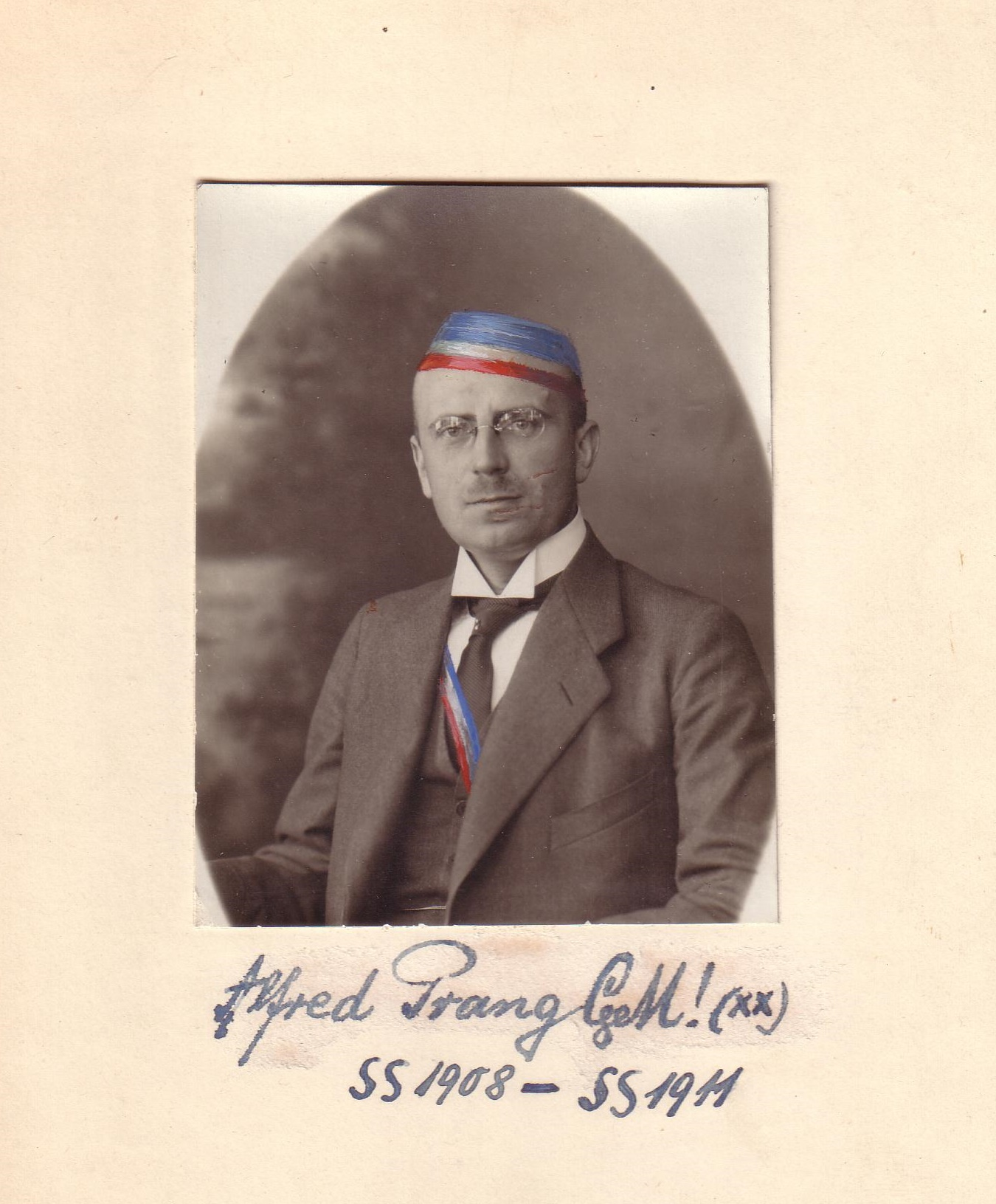 Porträtfotografie von Alfred Prang (1887-1967)